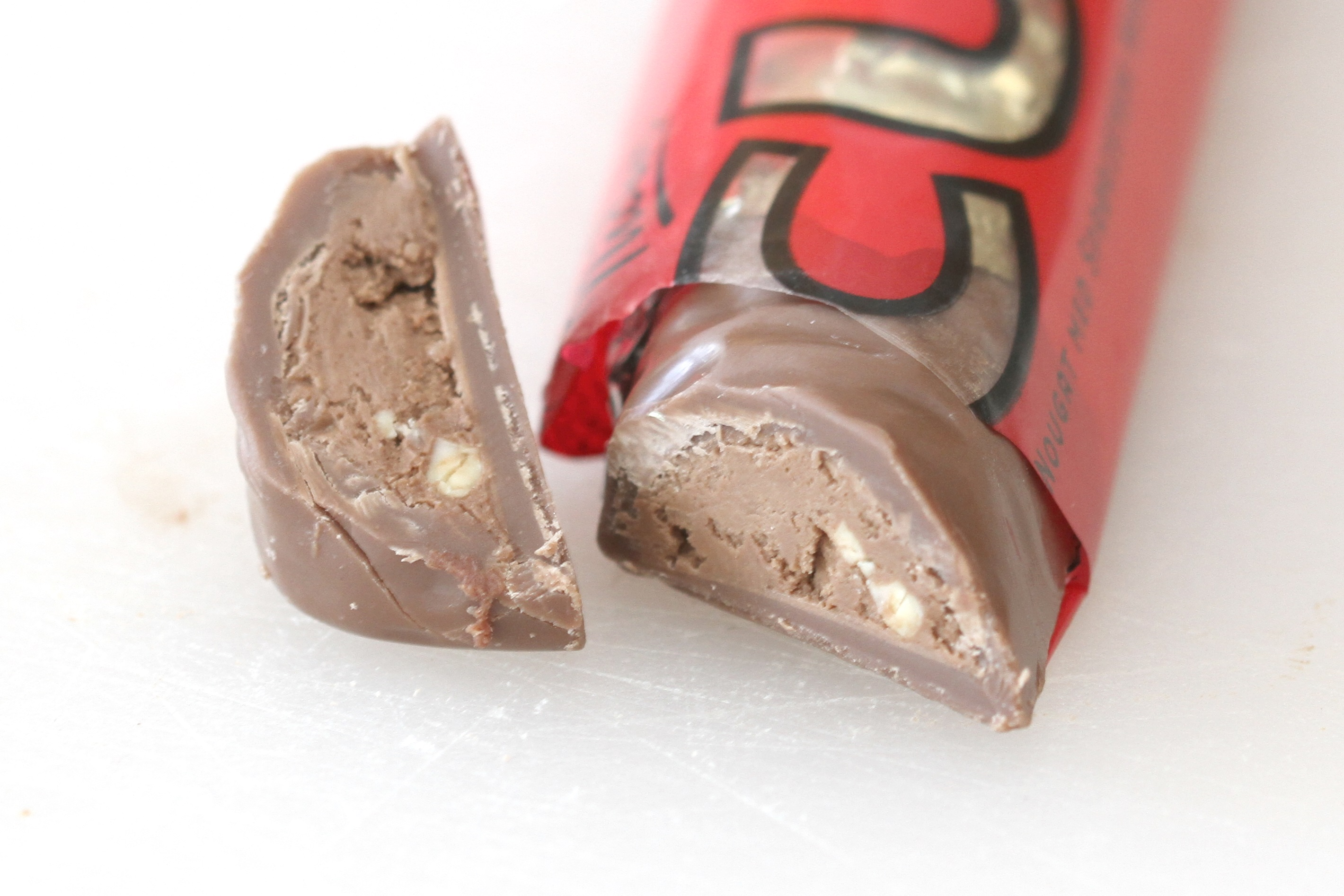 Sjokoladen Cuba.